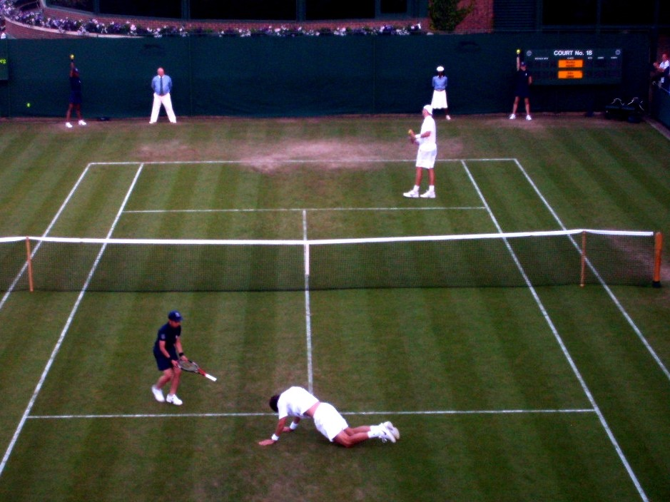 Dans son match contre John Isner à Wimbledon en 2010, Nicolas Mahut reste au sol quelques instants après avoir tenté un plongeon sur une balle impossible. Il est alors 20h58 lors de la deuxième journée et le score en est à 58-58 au cinquième set.